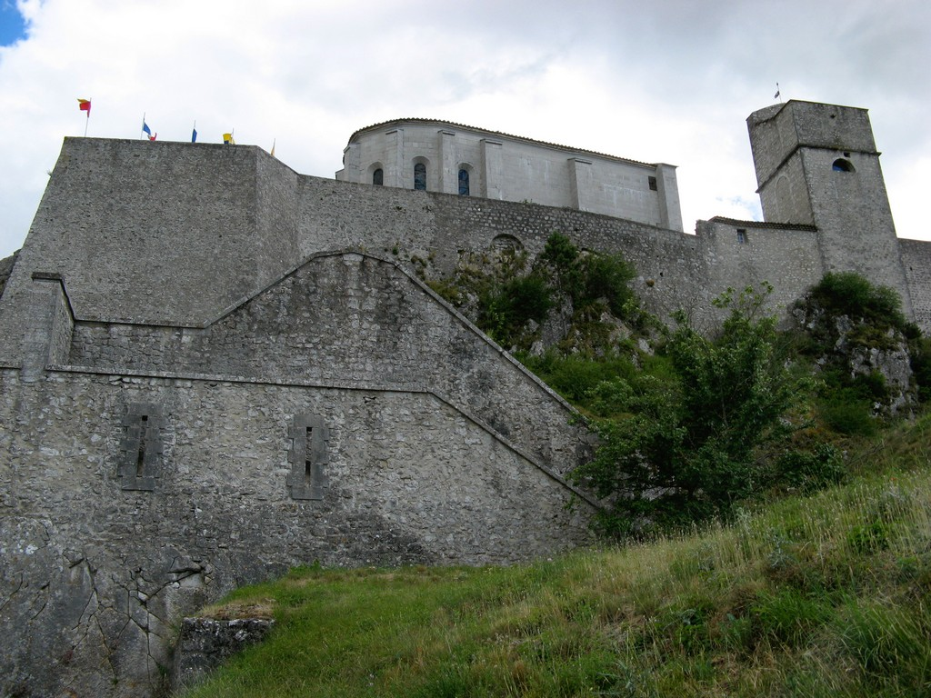 Sisteron